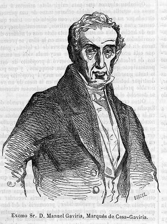 Manuel Gaviria, marqués de Casa-Gaviria, en la revista española La Ilustración.